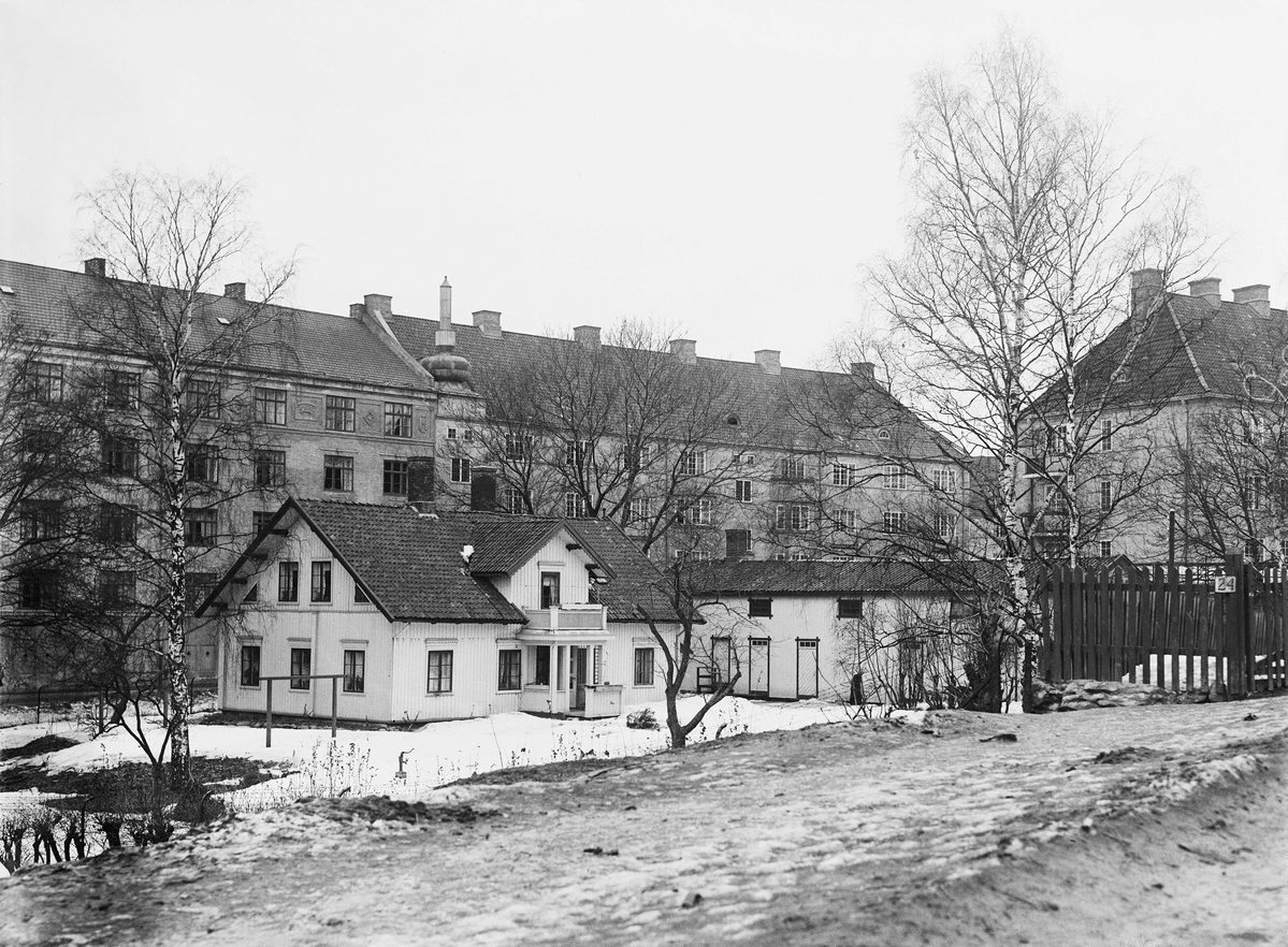 Solitude løkke, Fagerborggata 24, revet 1938. I bakgrunnen: boligkomplekset Jessenløkken. Ukjent fotograf (ca. 1925). Fra Byhistorisk samling hos Oslo Museum.